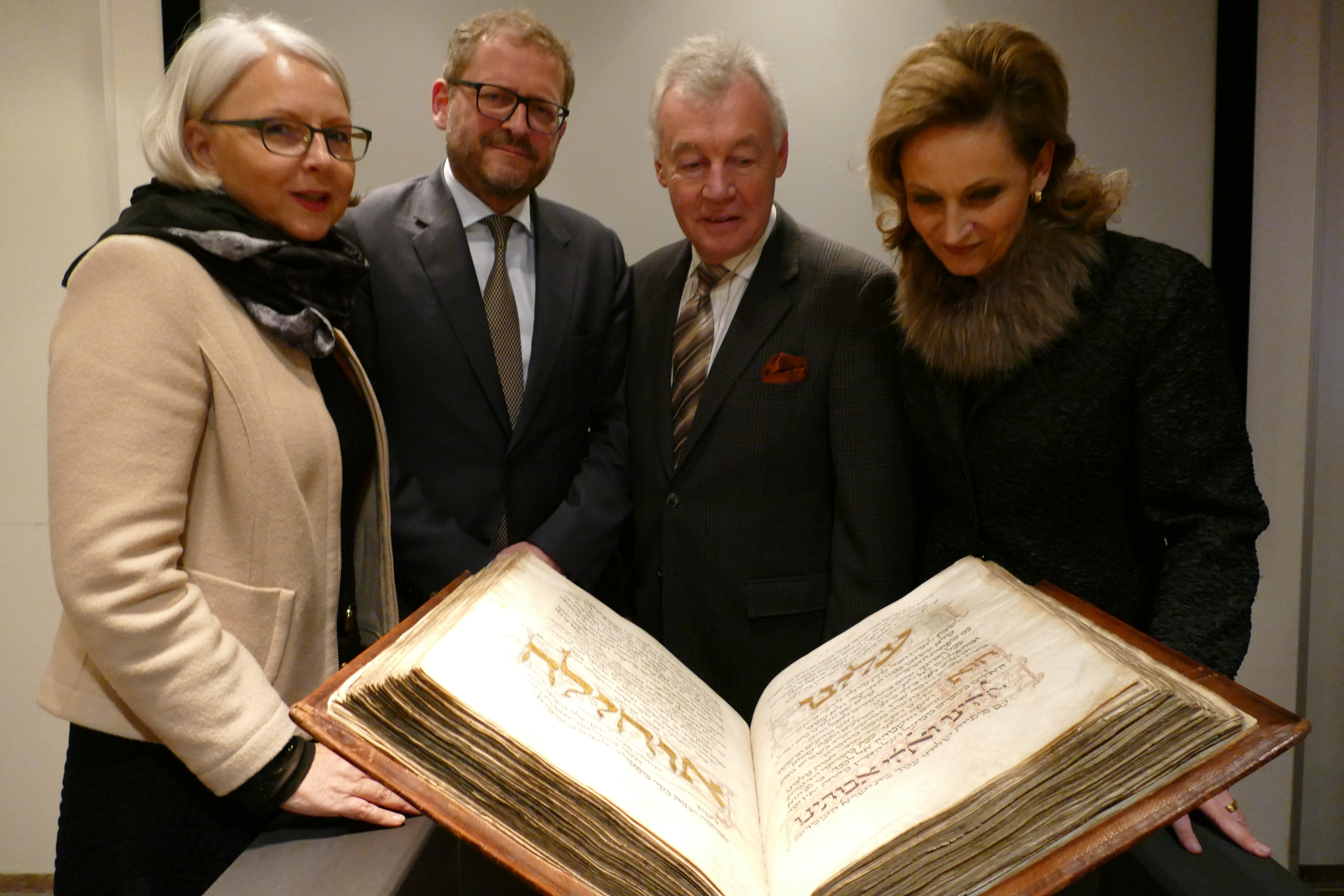 V.l.n.r.: Milena Karabaic, LVR-Dezernentin Kultur und Landschaftliche Kulturpflege, Dr. Emile Schrijver, Direktor des Joods Historisch Museum in Amsterdam, Prof. Dr. Jürgen Wilhelm, Vorsitzender der Landschaftsversammlung Rheinland und LVR-Direktorin Ulrike Lubek